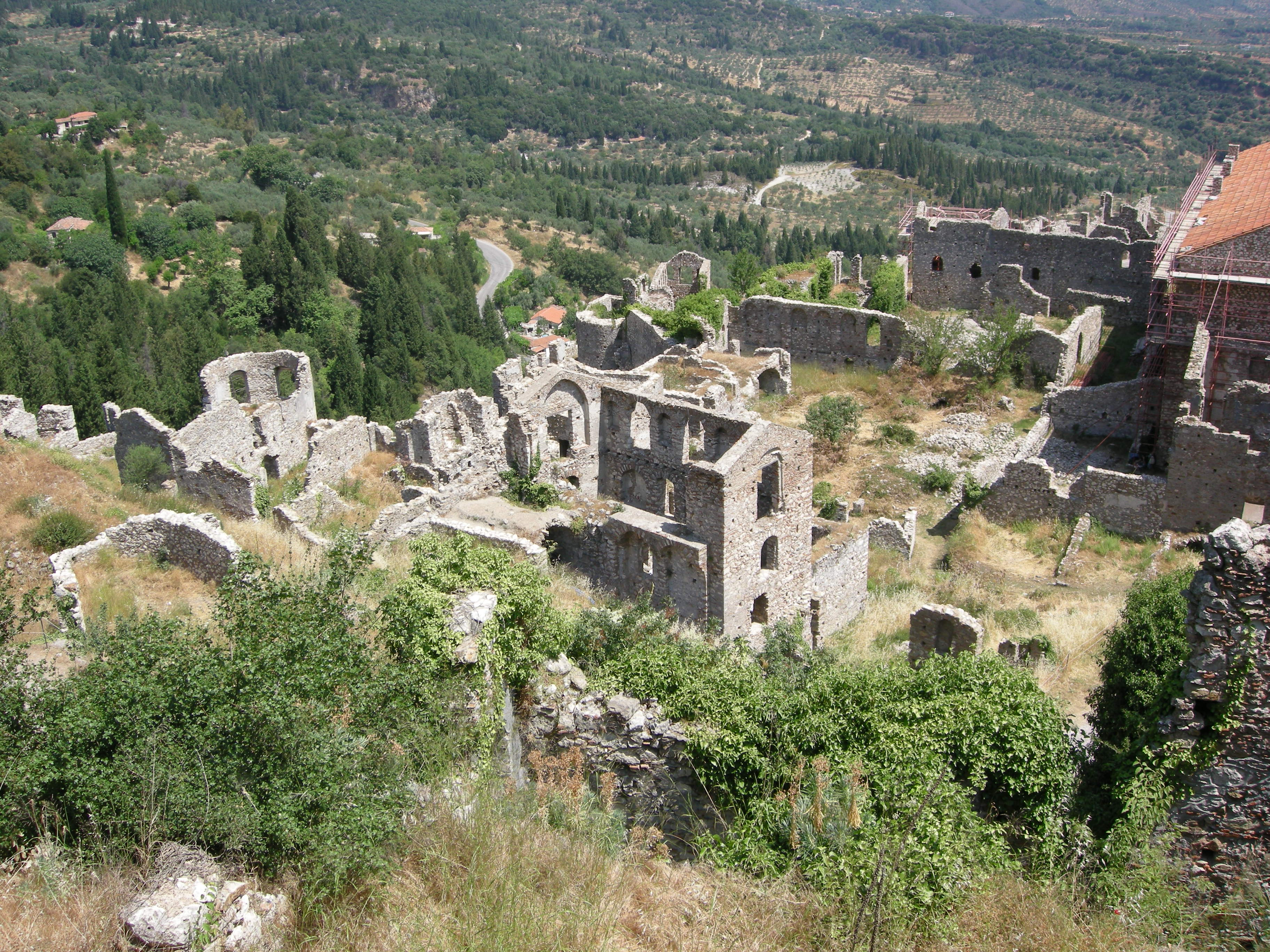 Mystra, veduta rovine